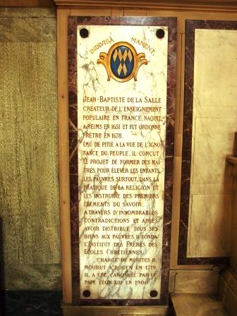 Erinnerungstafel für den französischen Priester, Pädagogen und Ordensgründer Jean Baptiste de La Salle (1651-1719) in der Église Saint-Sulpice (38, Rue Saint-Sulpice) in Paris, Frankreich.